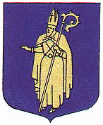 Wapen van Baarn